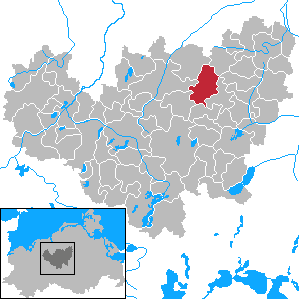 Prebberede in Mecklenburg-Vorpommern - District Güstrow